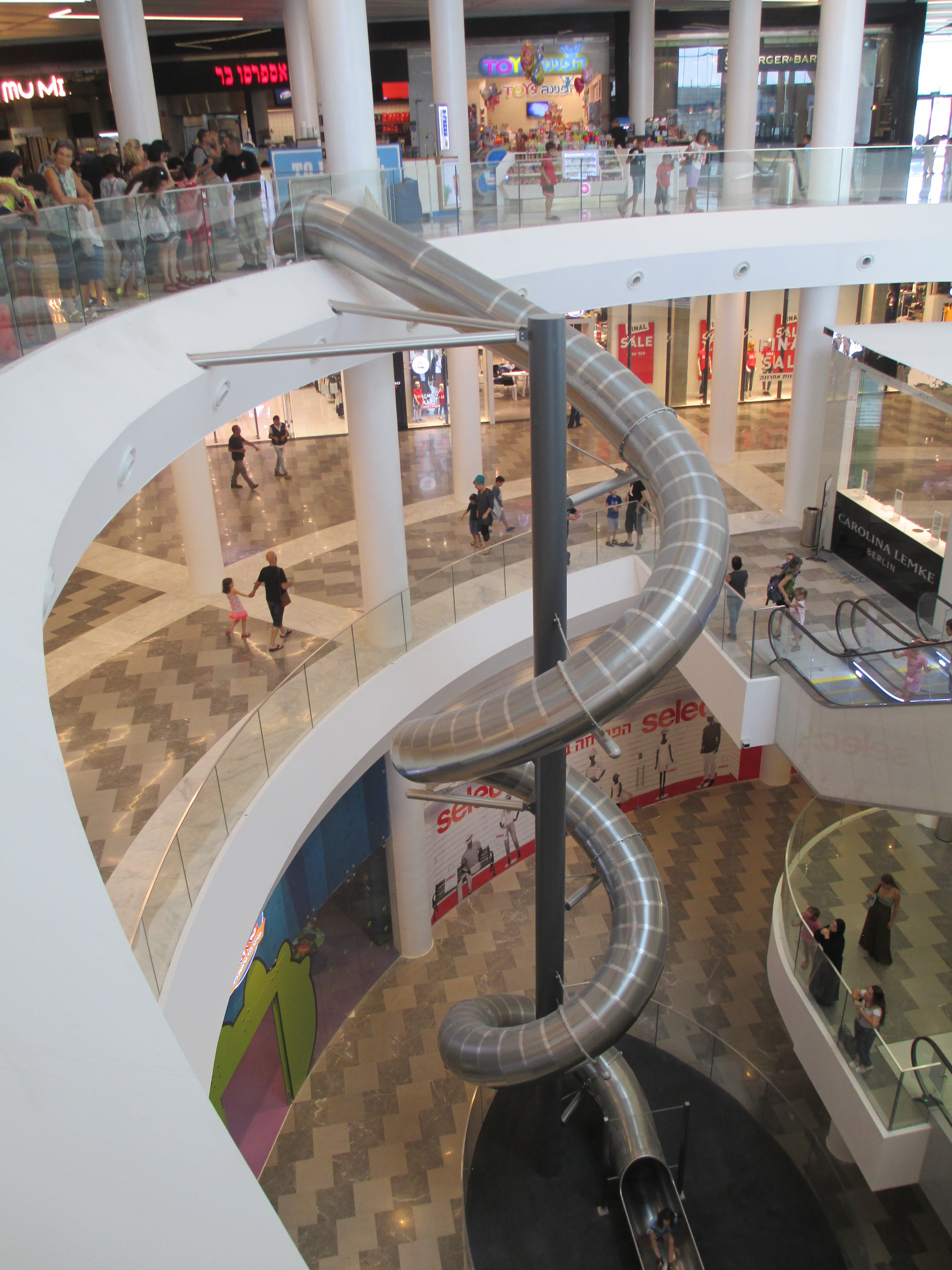 קניון אושילד בכפר סבא - המגלשה